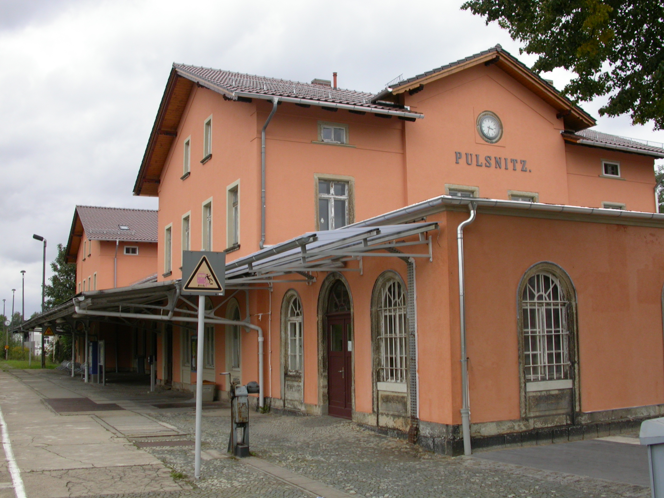 Empfangsgebäude des Bahnhofs in Pulsnitz